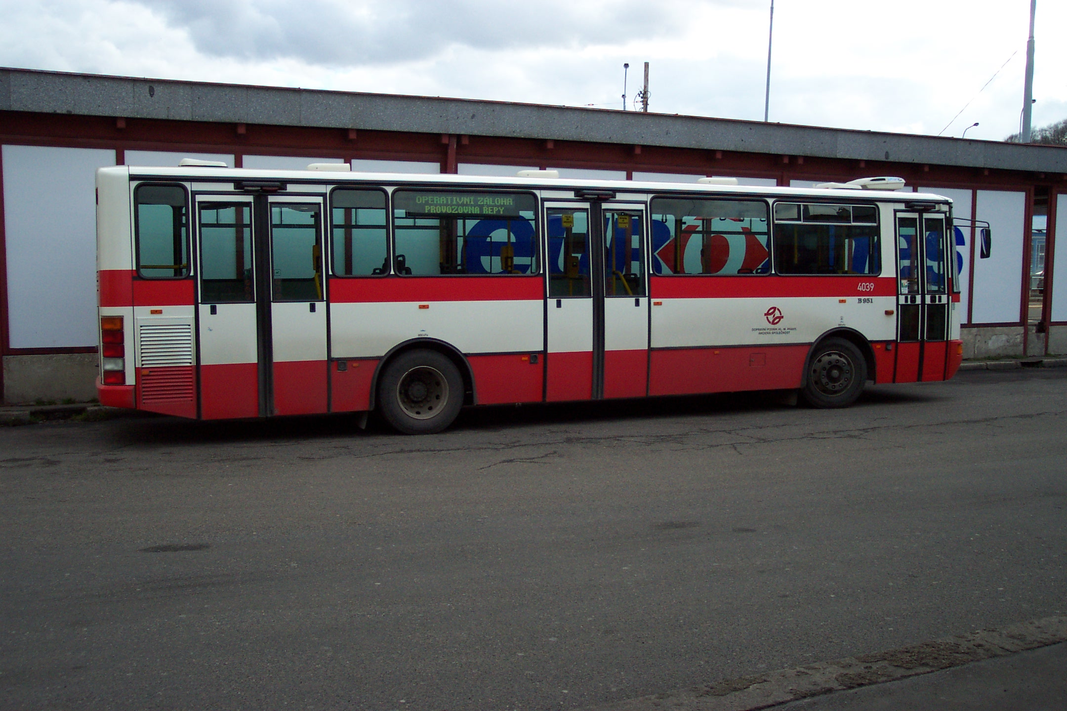 Autobus(y) v Praze na Knížecí - Bus(es) in Prague at the station Na Knížecí